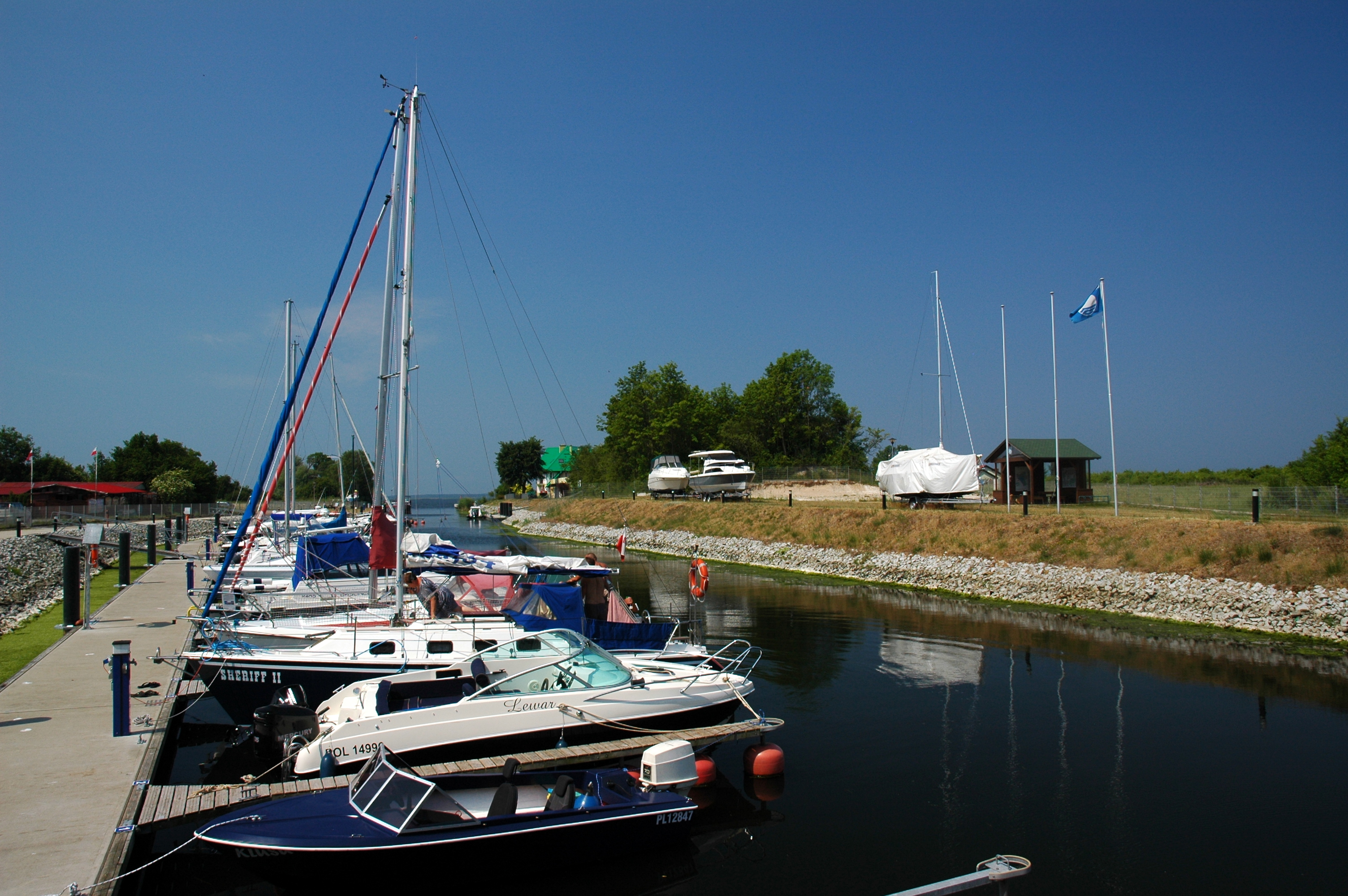 Port morski Wapnica